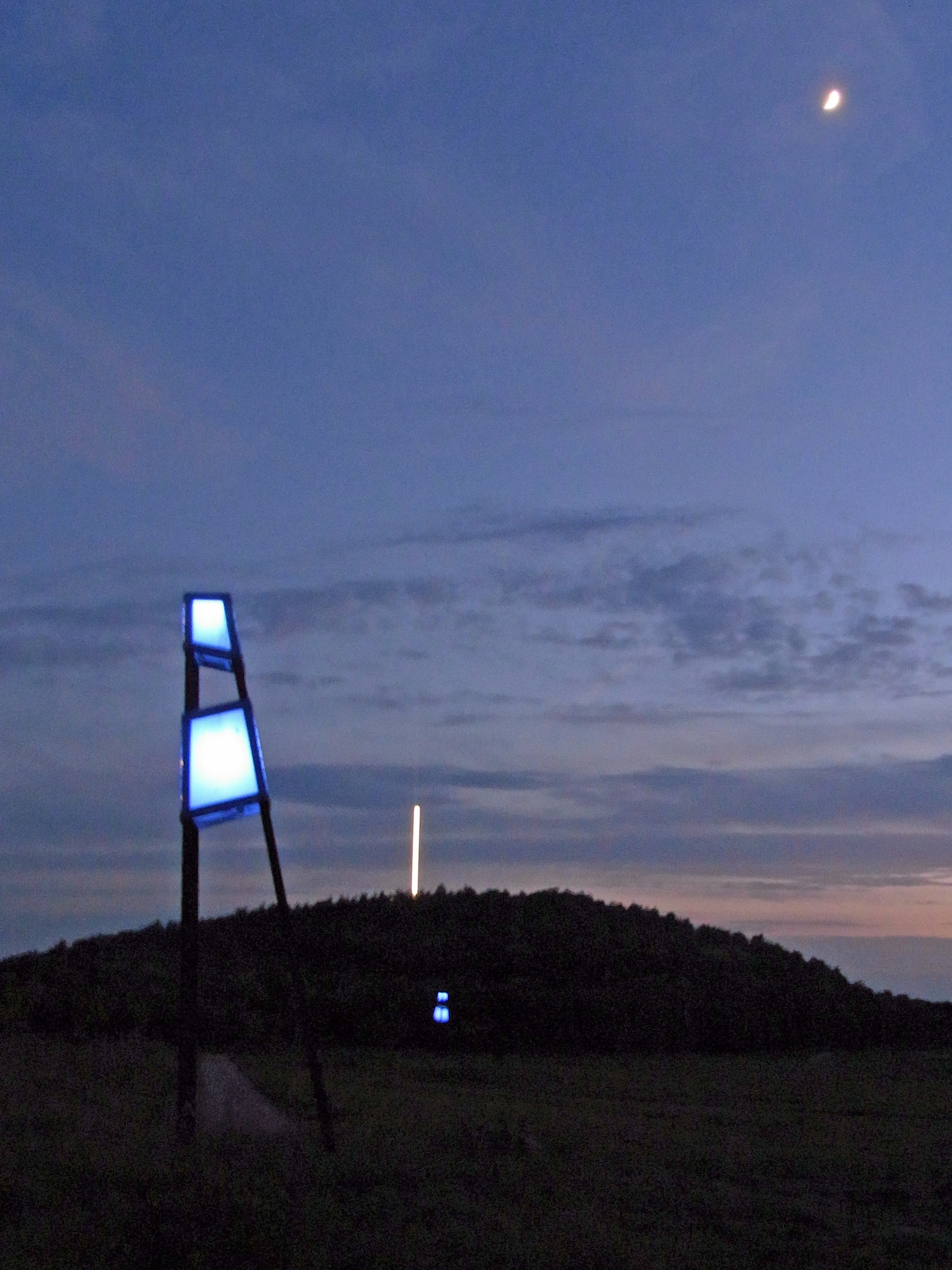 Halde Großes Holz: Lichtskulptur Impuls